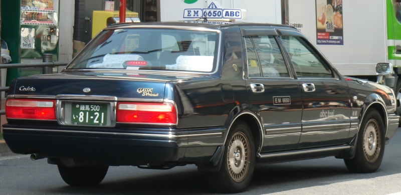 ABC交通のセドリック・クラシックSVプレミアム。